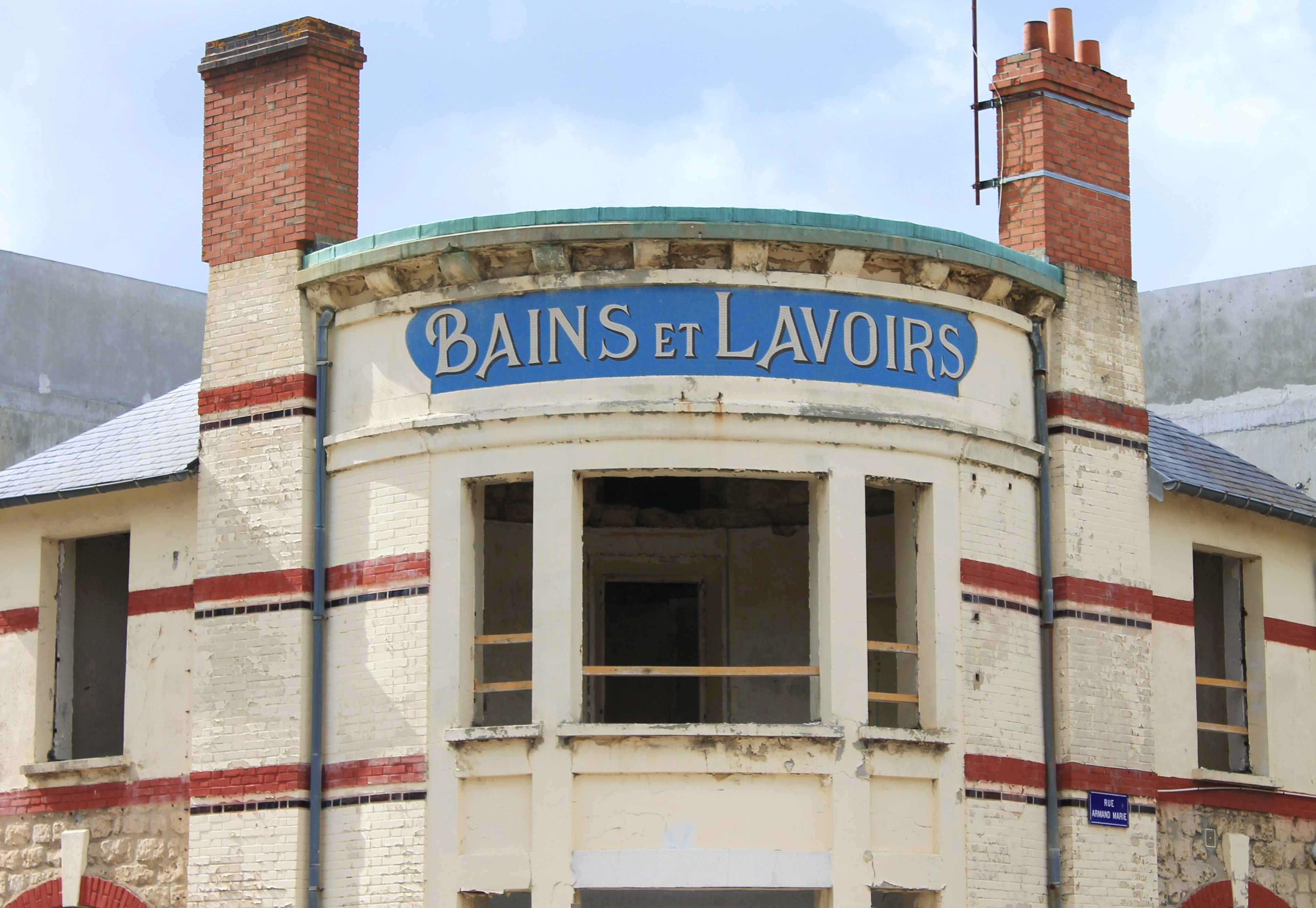 Établissement de bains et lavoirs au 36 rue Armand Marie à Caen (Calvados) Réhabilitation du bâtiment en logements.